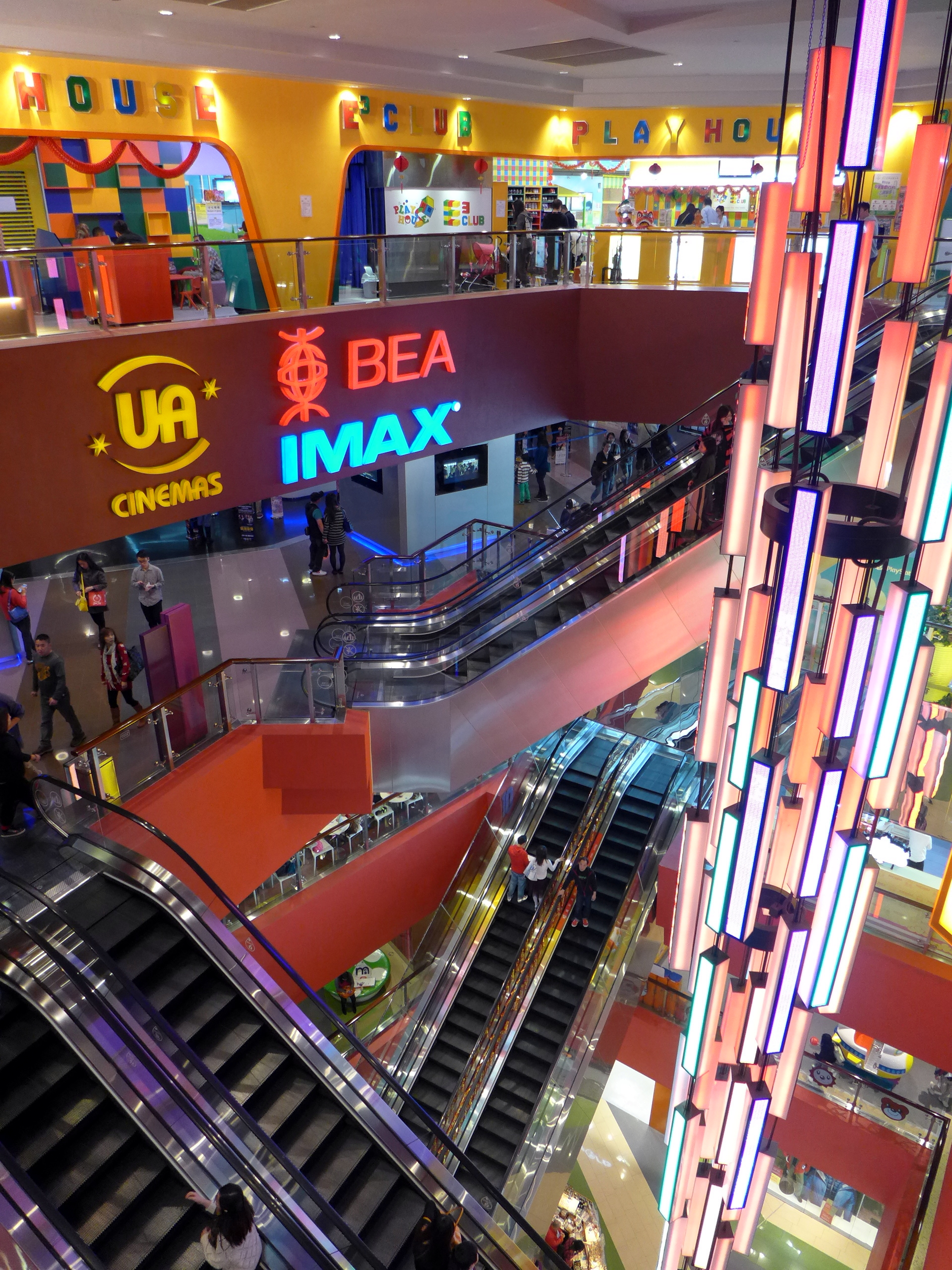 HK MegaBox Wonderfall